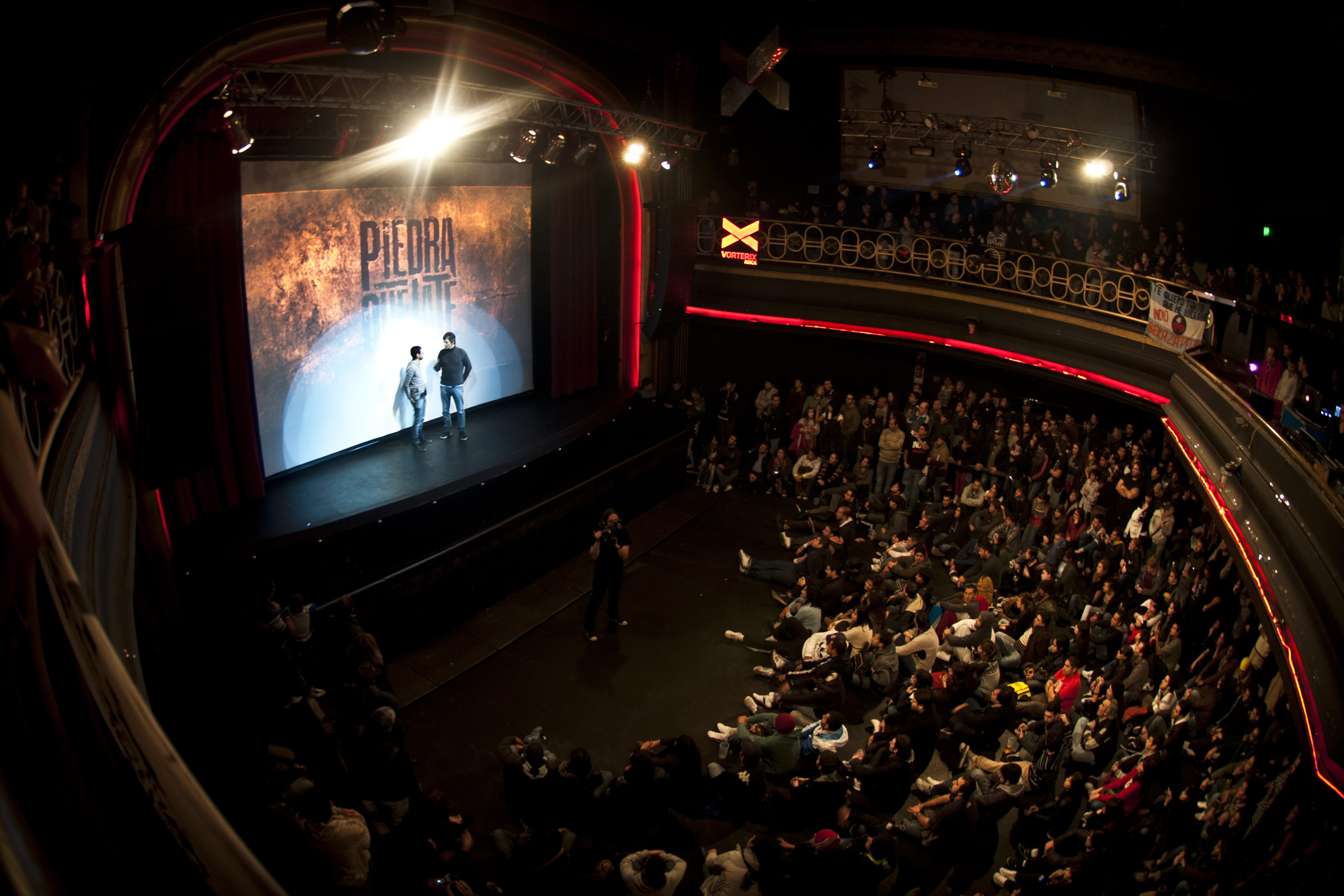 Presentación del video documental Piedra que late, sobre la Misa India celebrada en Tandil el 3 de diciembre de 2011. La presentación se realizó en el Teatro Vorterix el 9 de julio de 2013.